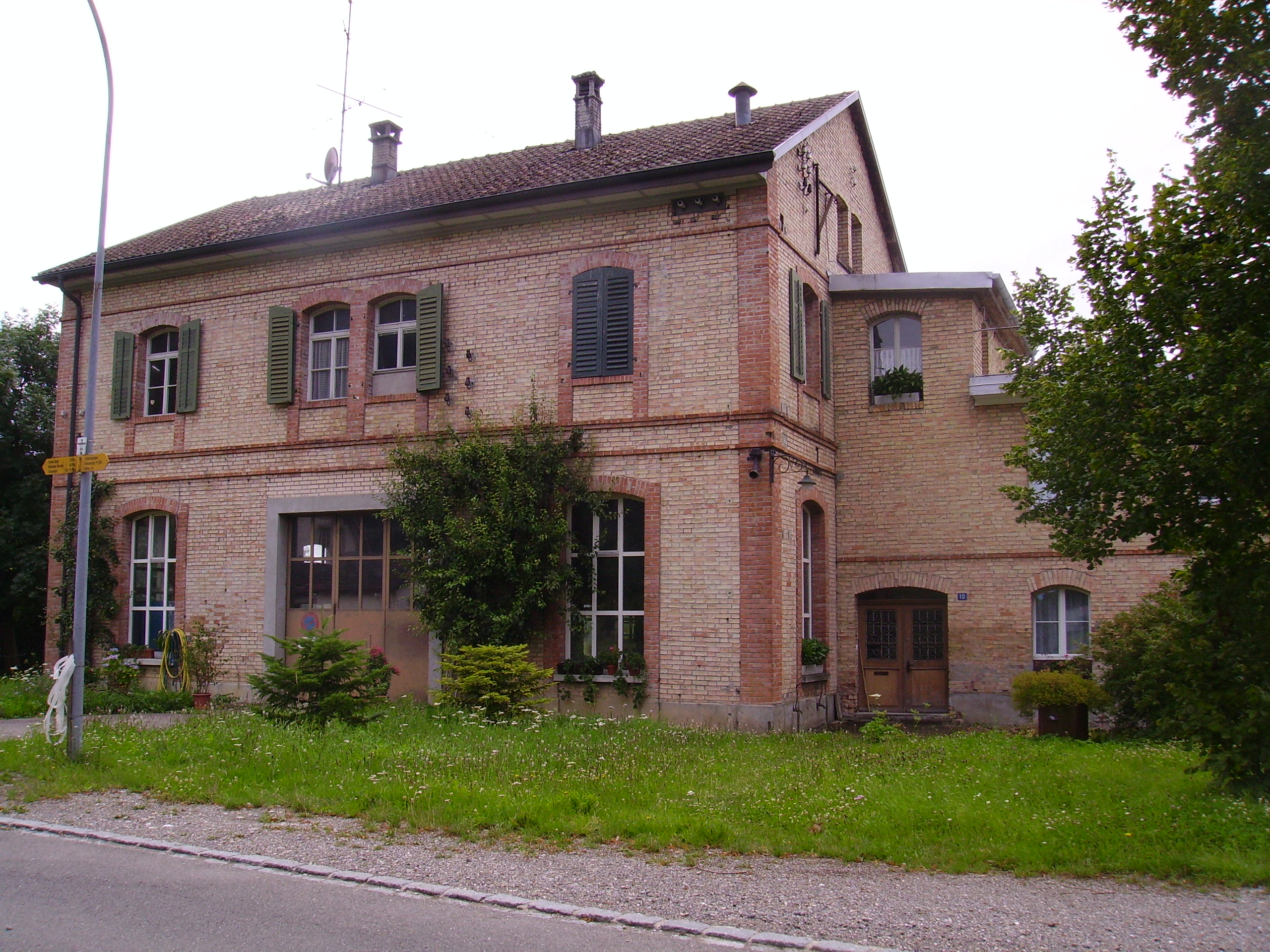 Das ehemalige Maschinenhaus des Wasser- und Elektrizitätswerks Hallau (WEH) in Wunderklingen an der Wutach im Kanton Schaffhausen